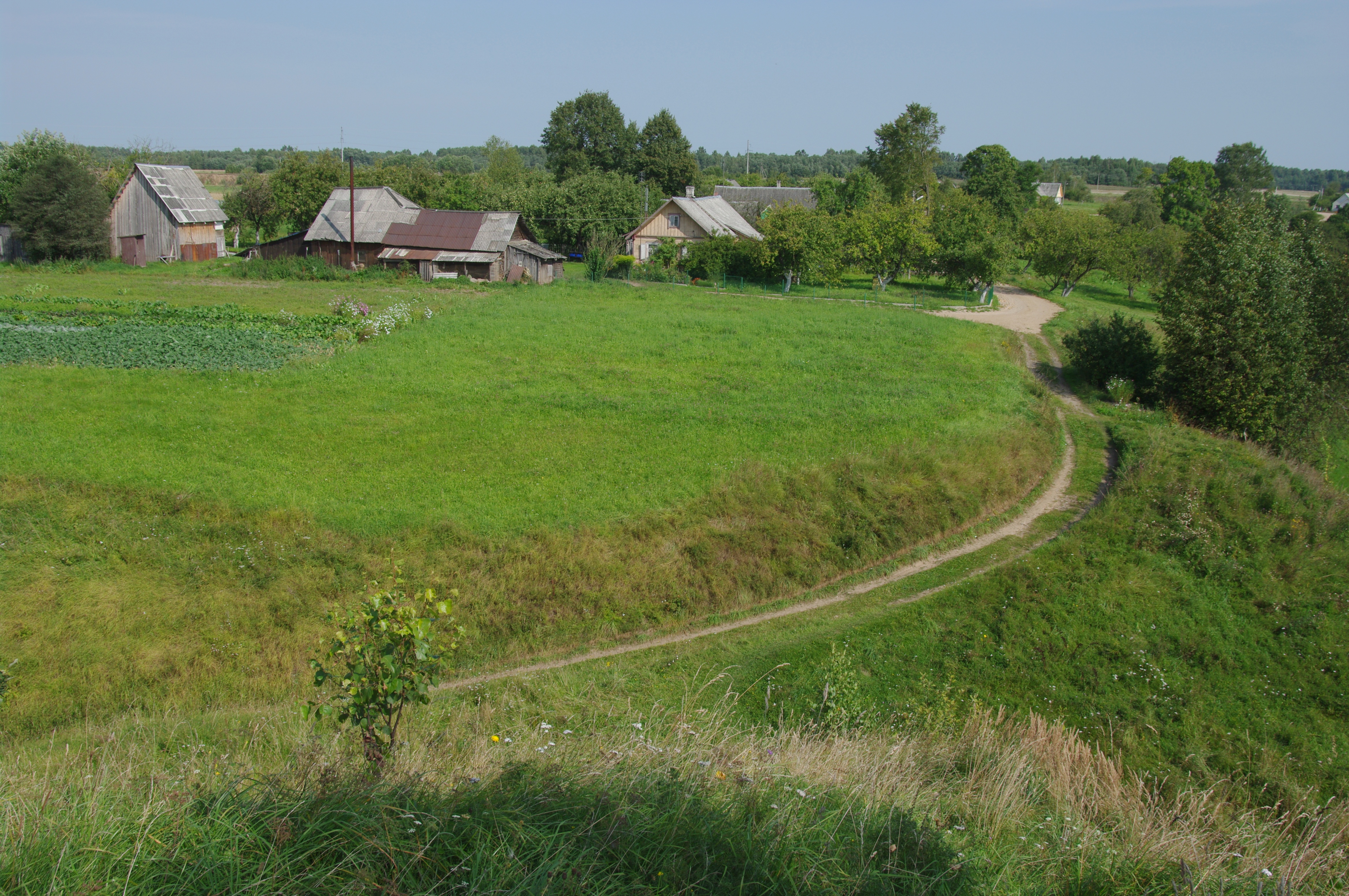 Piliakalnio gyvenvietė šalia Nemenčinės piliakalnio (